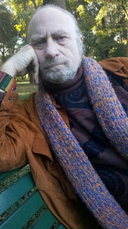 Archivo personal